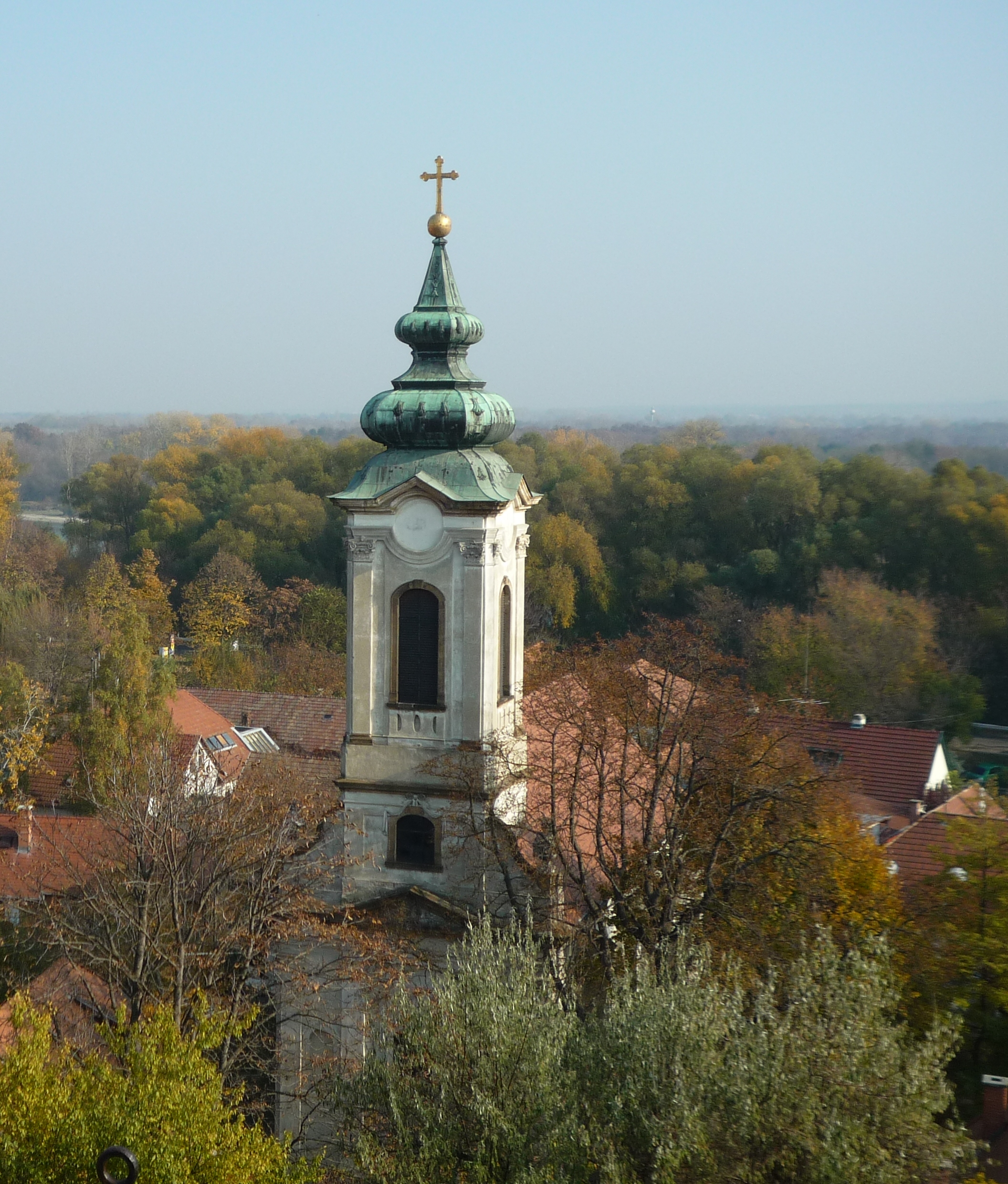 Храм Преображения Сентендре